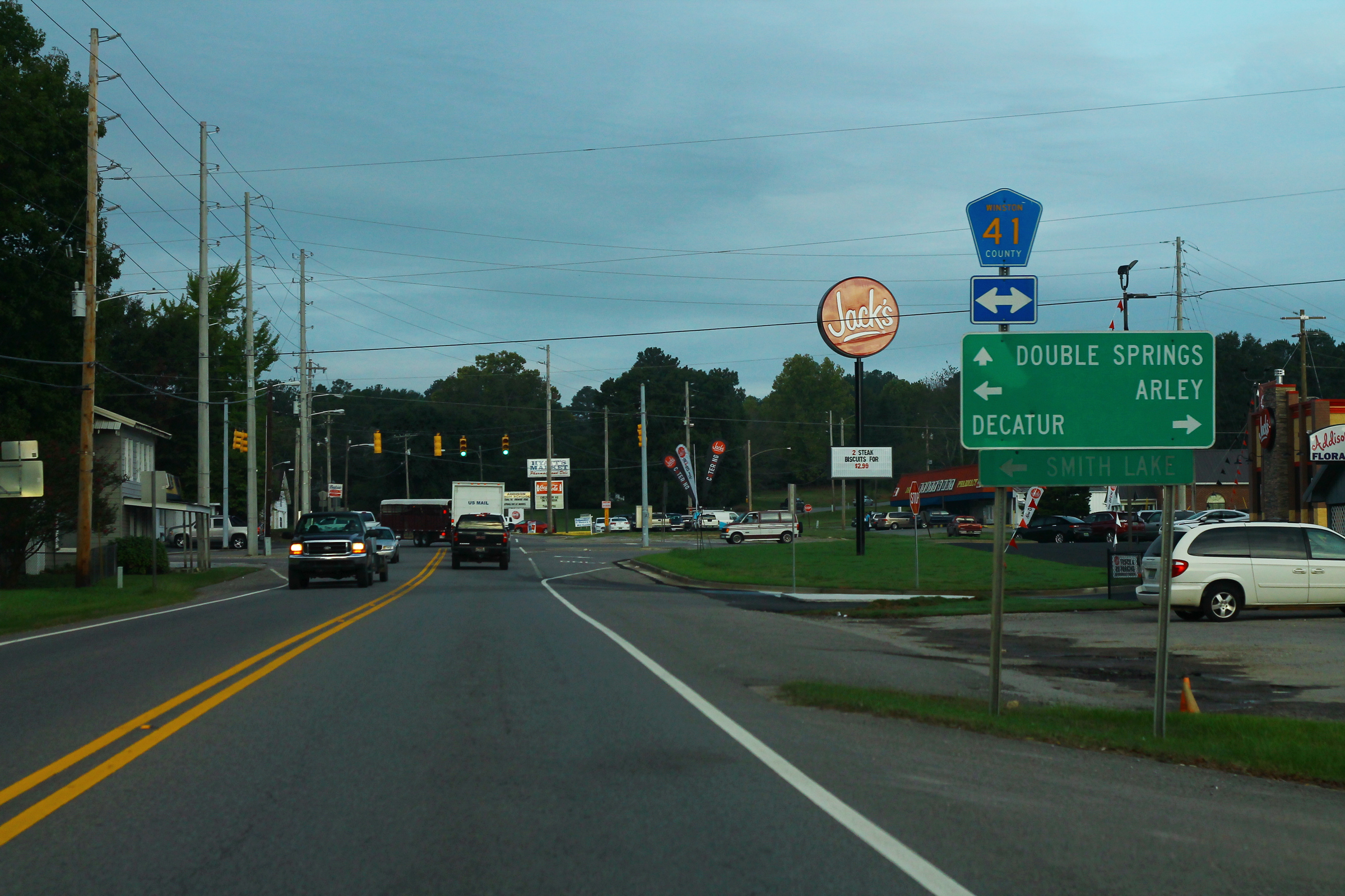 US278 West - Winston CR41 - Addison